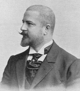 August Lehr, cycliste allemand